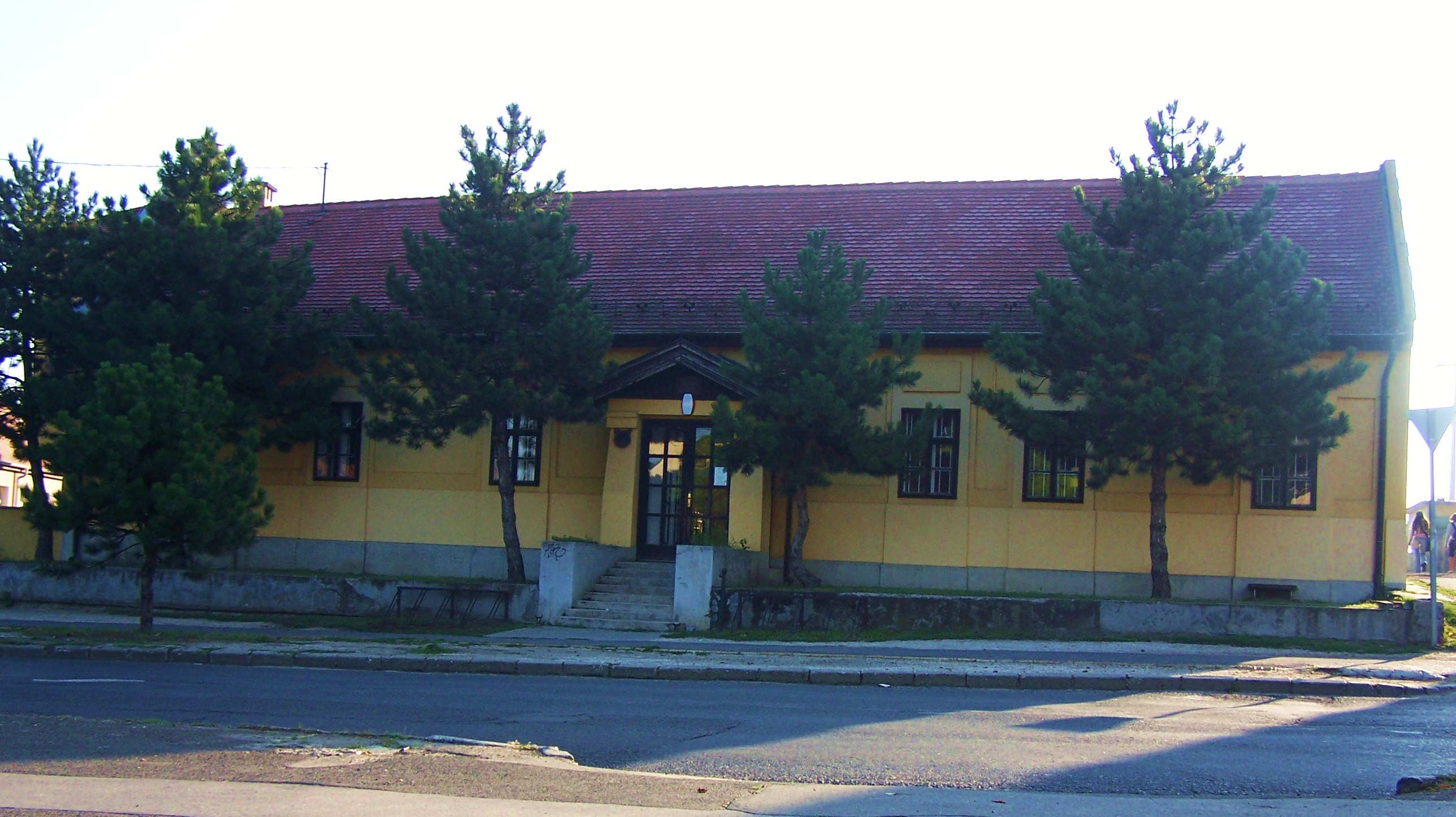 Prónay-ház (Pécel, Maglódi u.) This is a photo of a monument in Hungary, Identifier: 7218